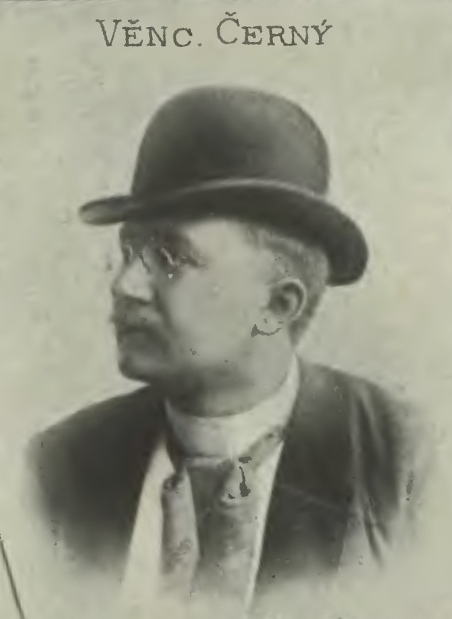 Portrét – Věnceslav Černý (1865 - 1936), Český malíř a ilustrátor.